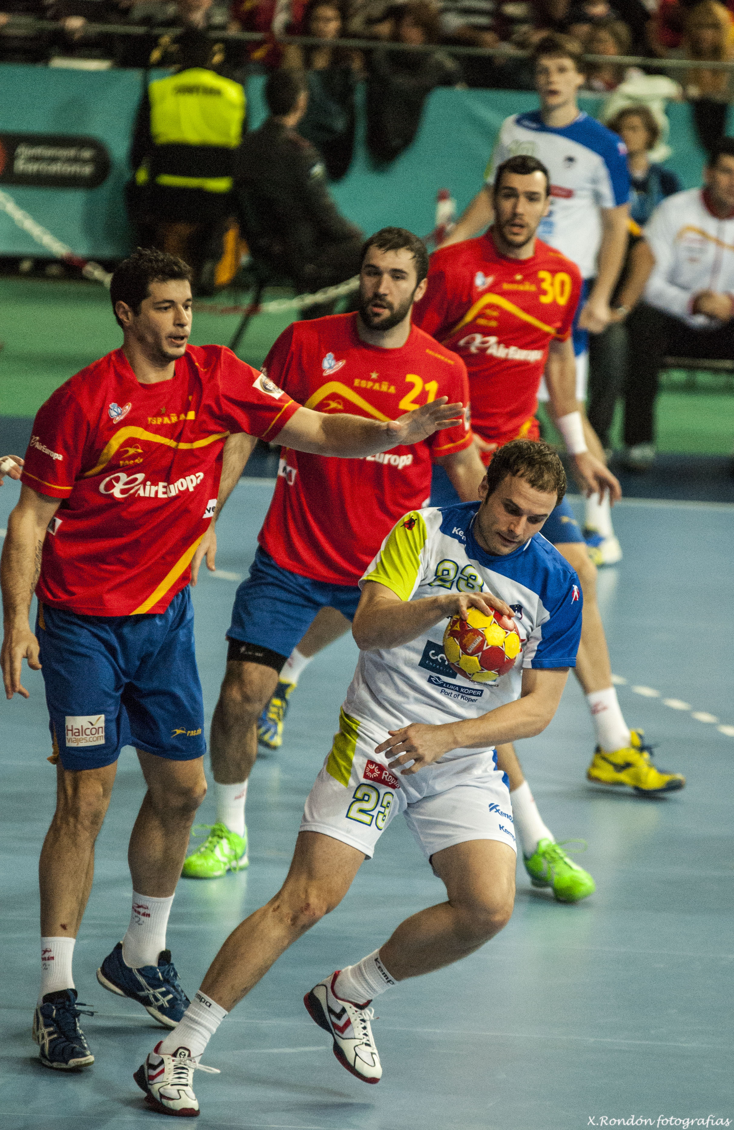 España-Eslovenia